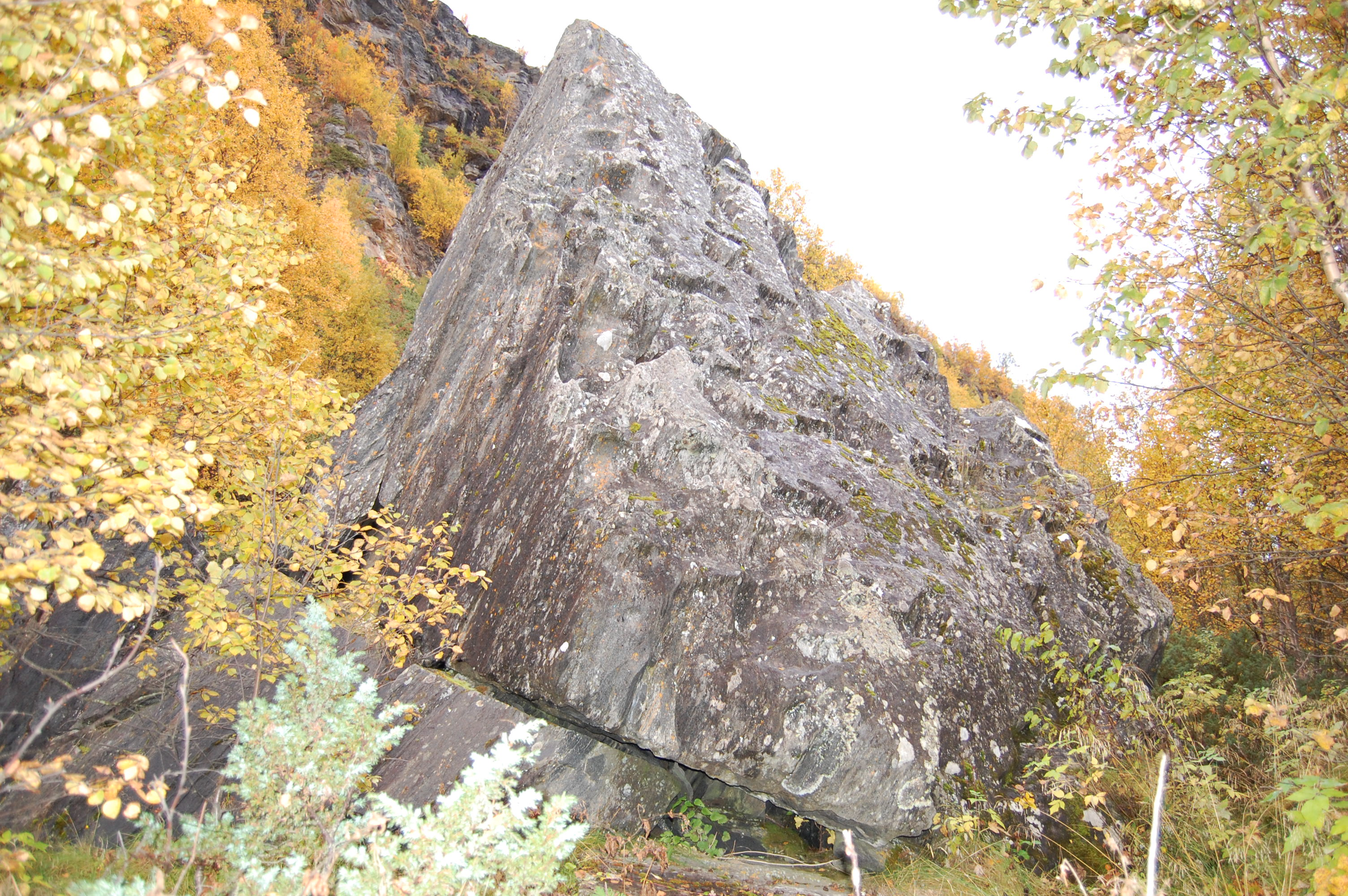 Stabben Siedi in Balsfjord Troms, Norway